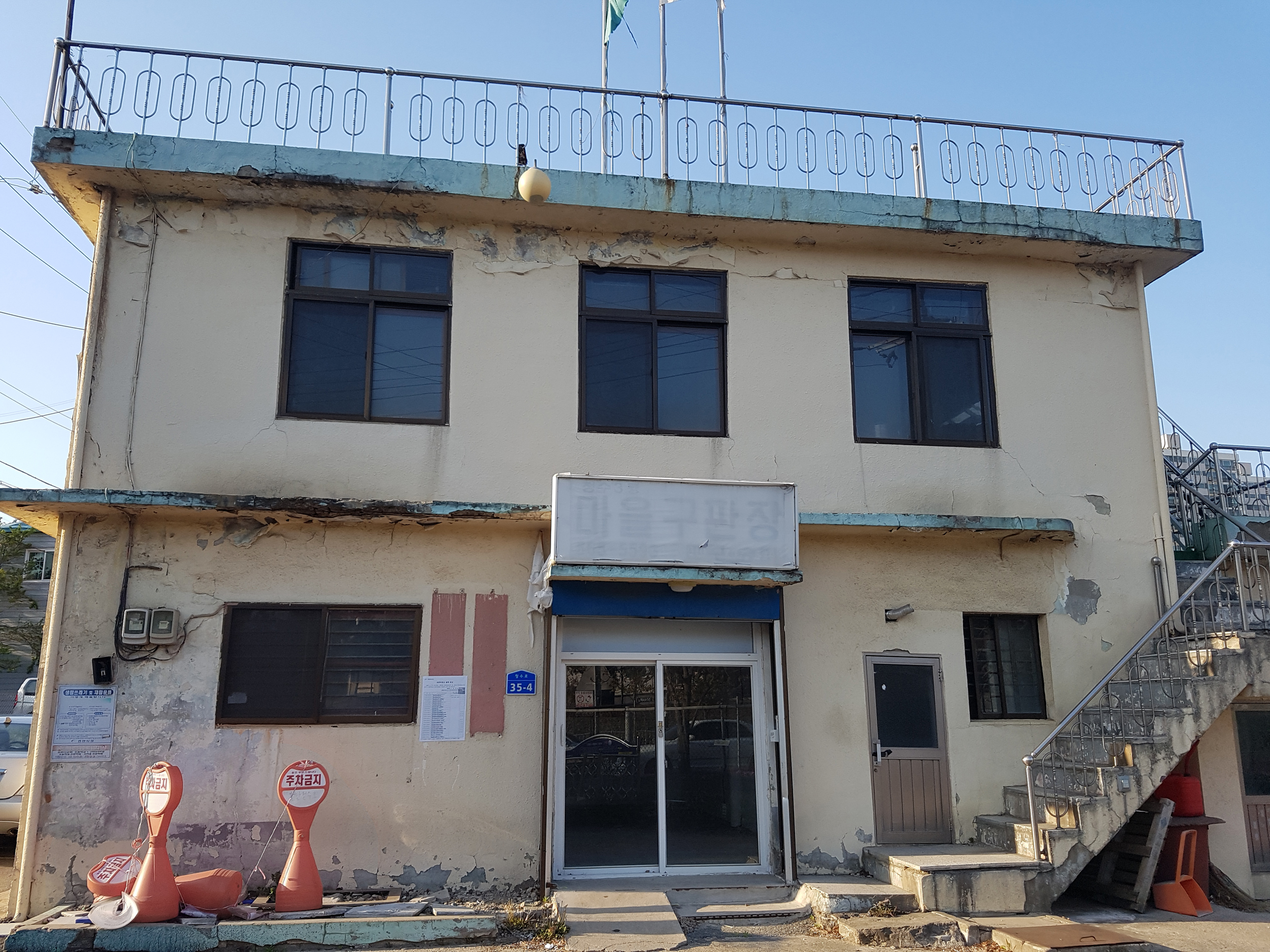 구판장